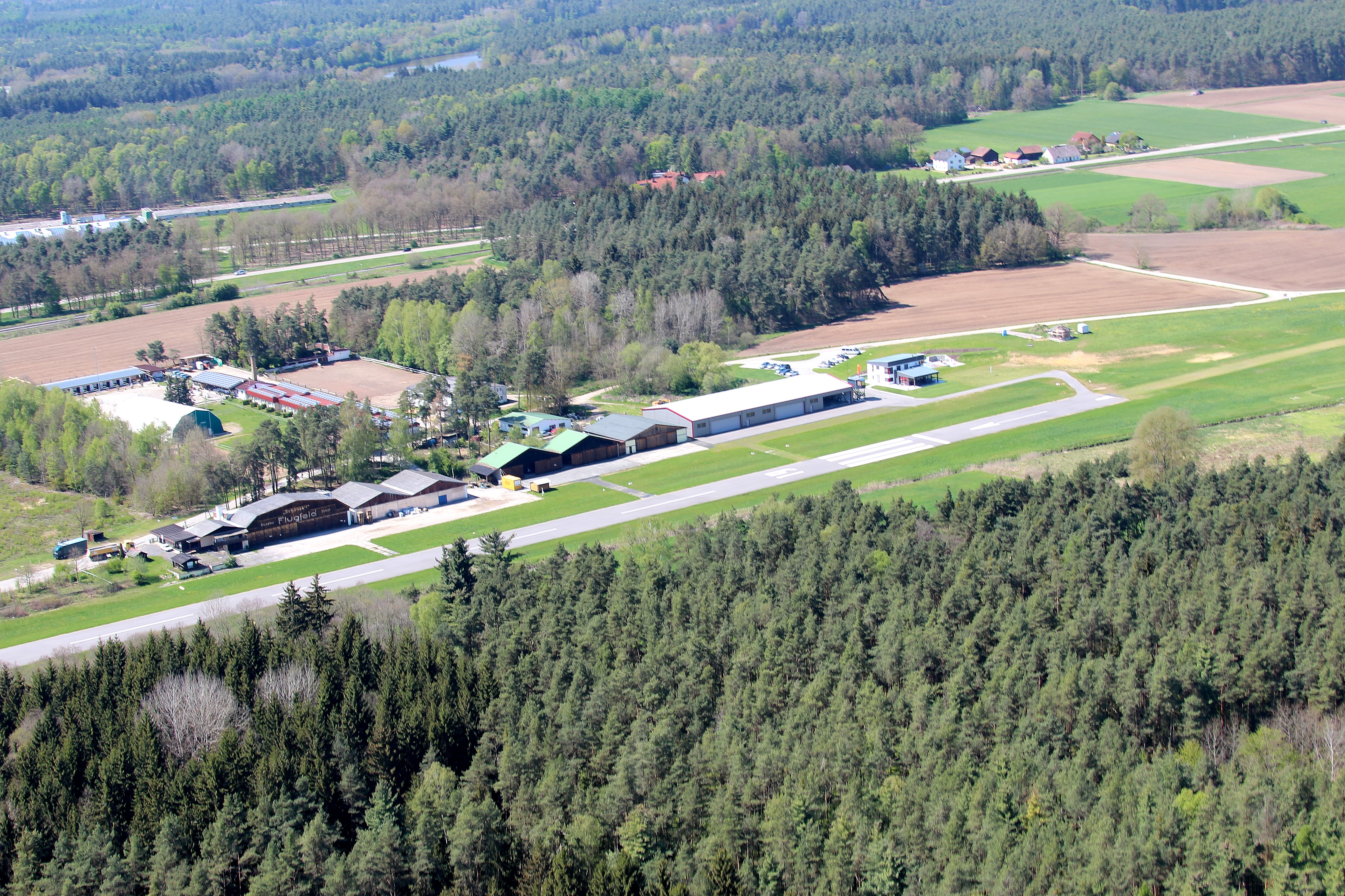 Flugplatz Bruck; Bruck, Landkreis Schwandorf, Oberpfalz, Bayern